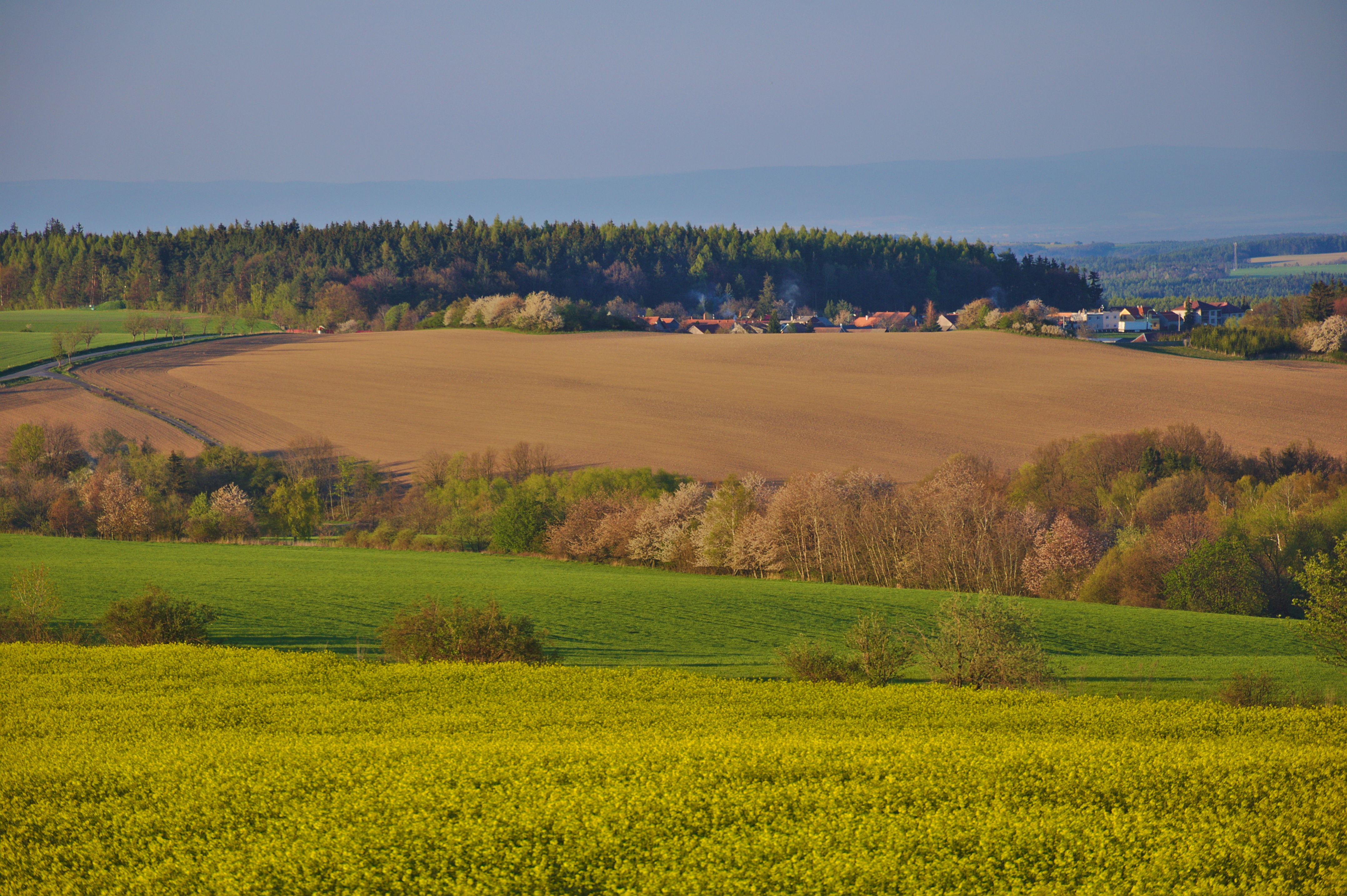 Pohled na vesnici z Vrabčáku, Labutice, Suchdol, okres Prostějov